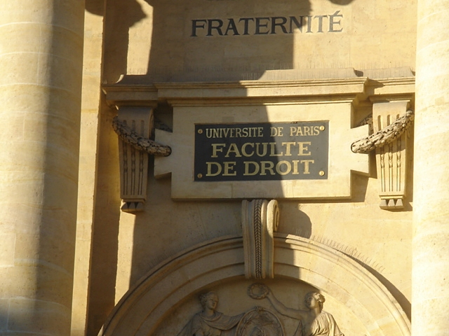 Cartouche de la façade de la faculté de droit de l'Université de Paris I et Paris II.